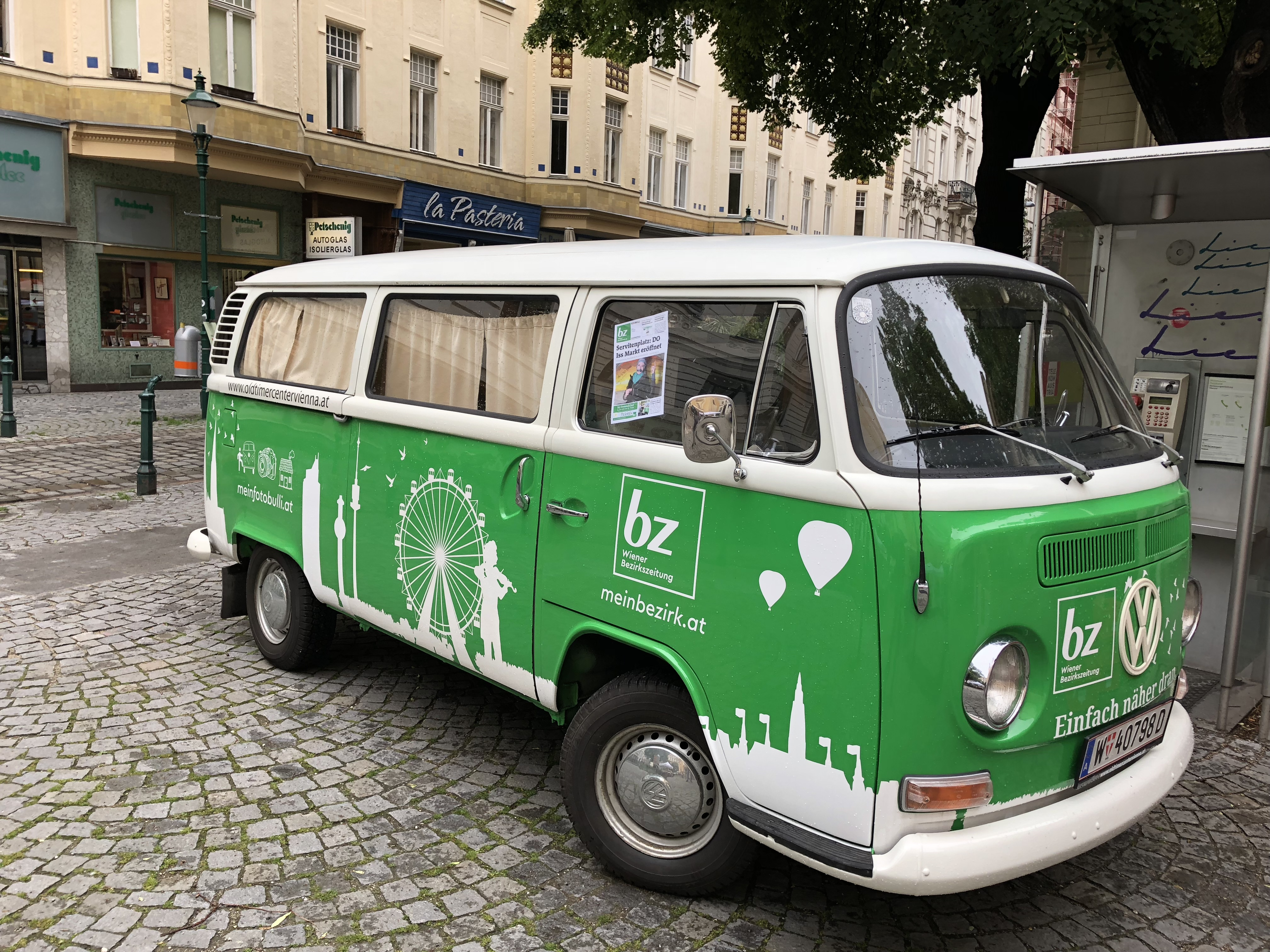 bz Fotobulli